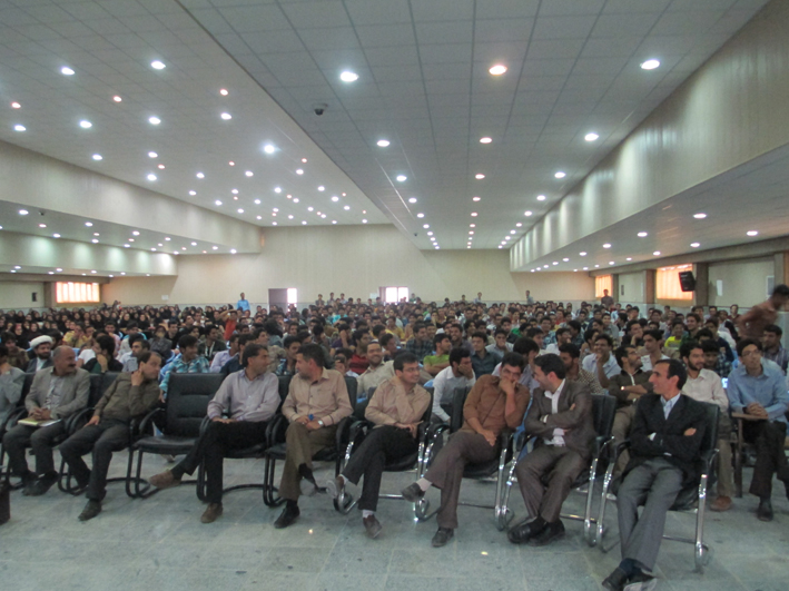 تالار اجتماعات دانشگاه صنعتی سیرجان